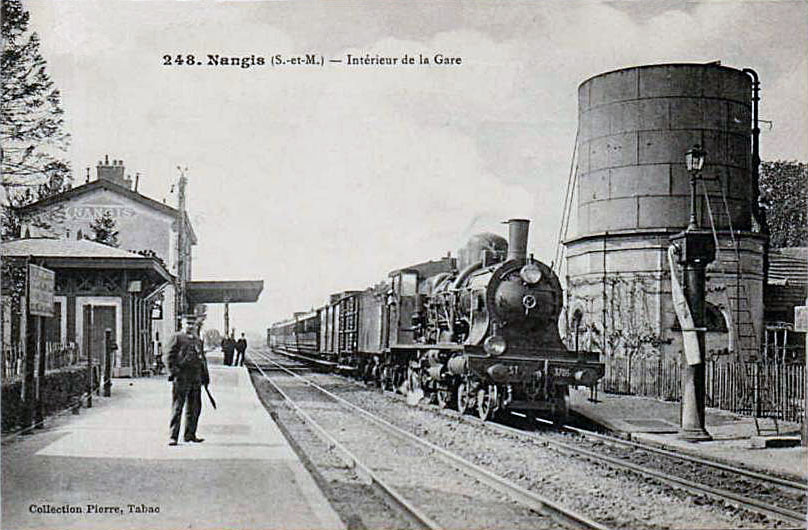 Nangis - Intérieur de la gare.